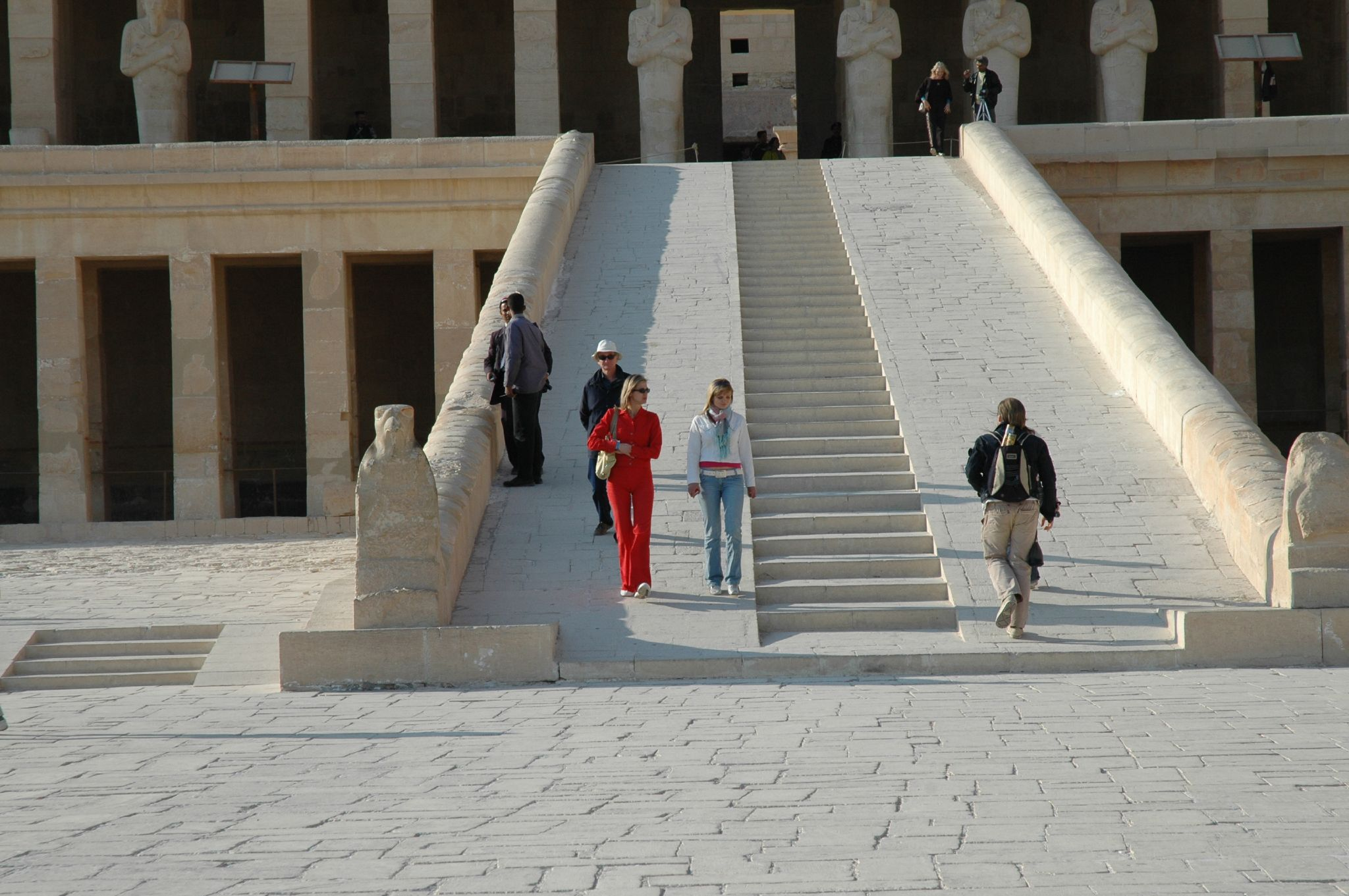 Tempio di Hatshepsut: scalinata